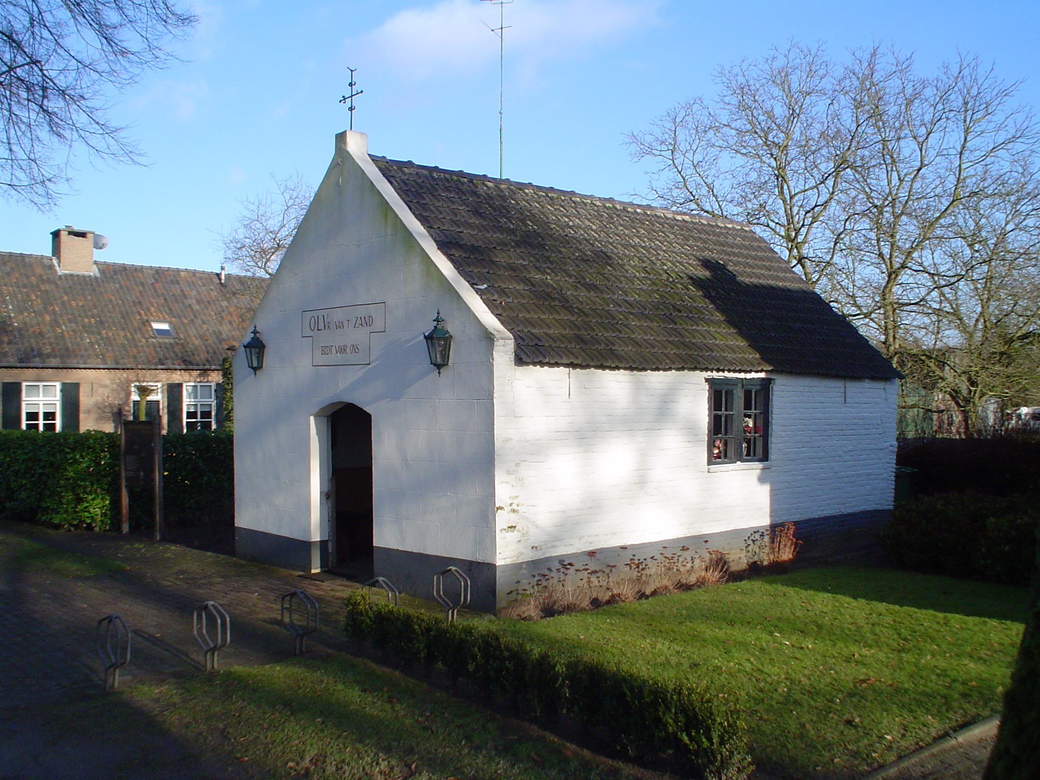 Kapel Onze Lieve Vrouw van 't Zand te Zandoerle; gebouwd in 1817